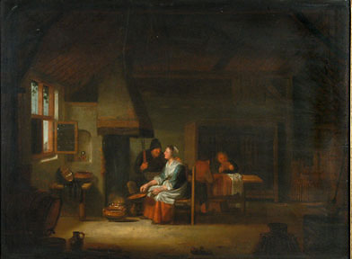 painting